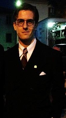 L'attore Mattia Zaccaro Garau nei panni dell'avvocato Mario Landriani nel film Il pretore di Giulio Base.